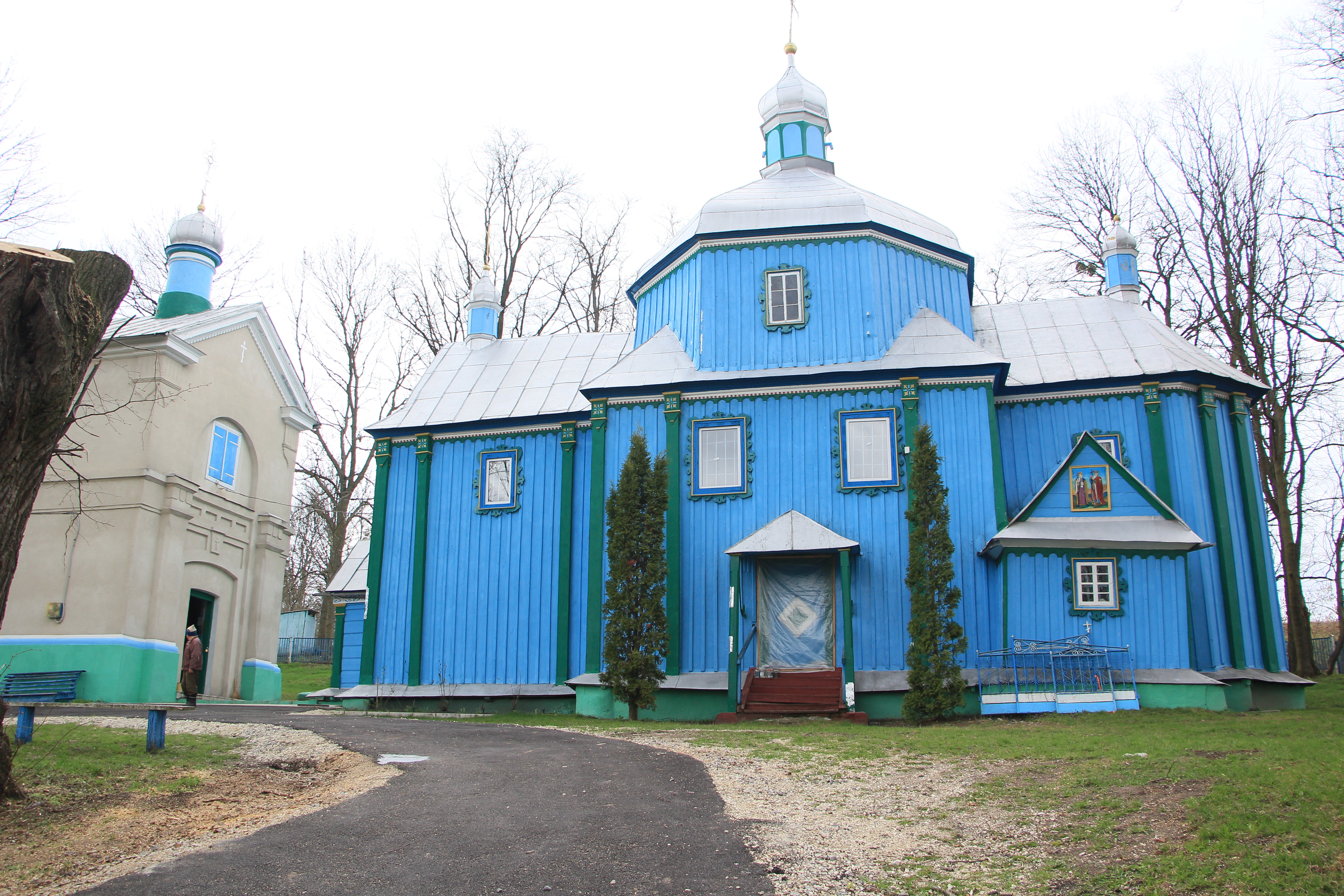 Дерев'яна церква в селі Вілія Шумського району, Тернопільської області